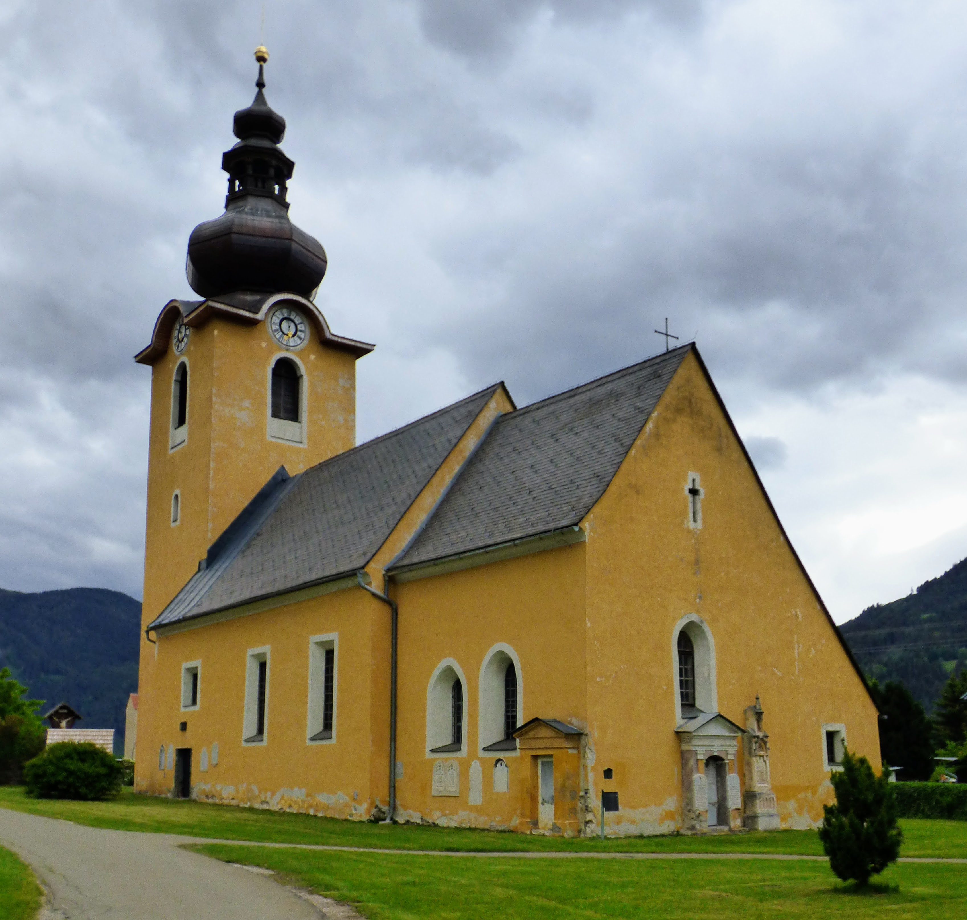 Pfarrkirche Scheifling Object location47° 09′ 00.57″ N, 14° 24′ 33.63″ E